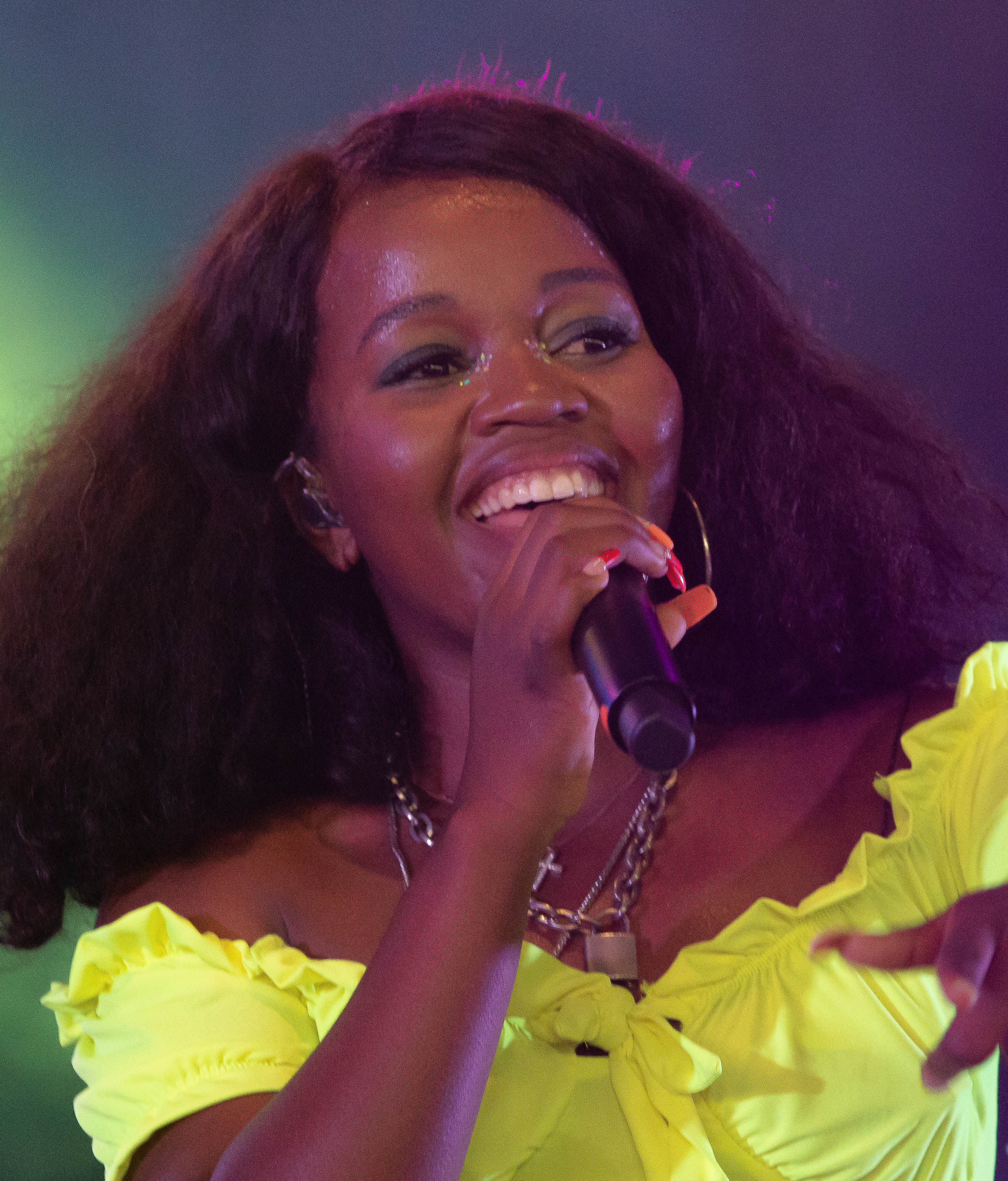 Tkay Maidza